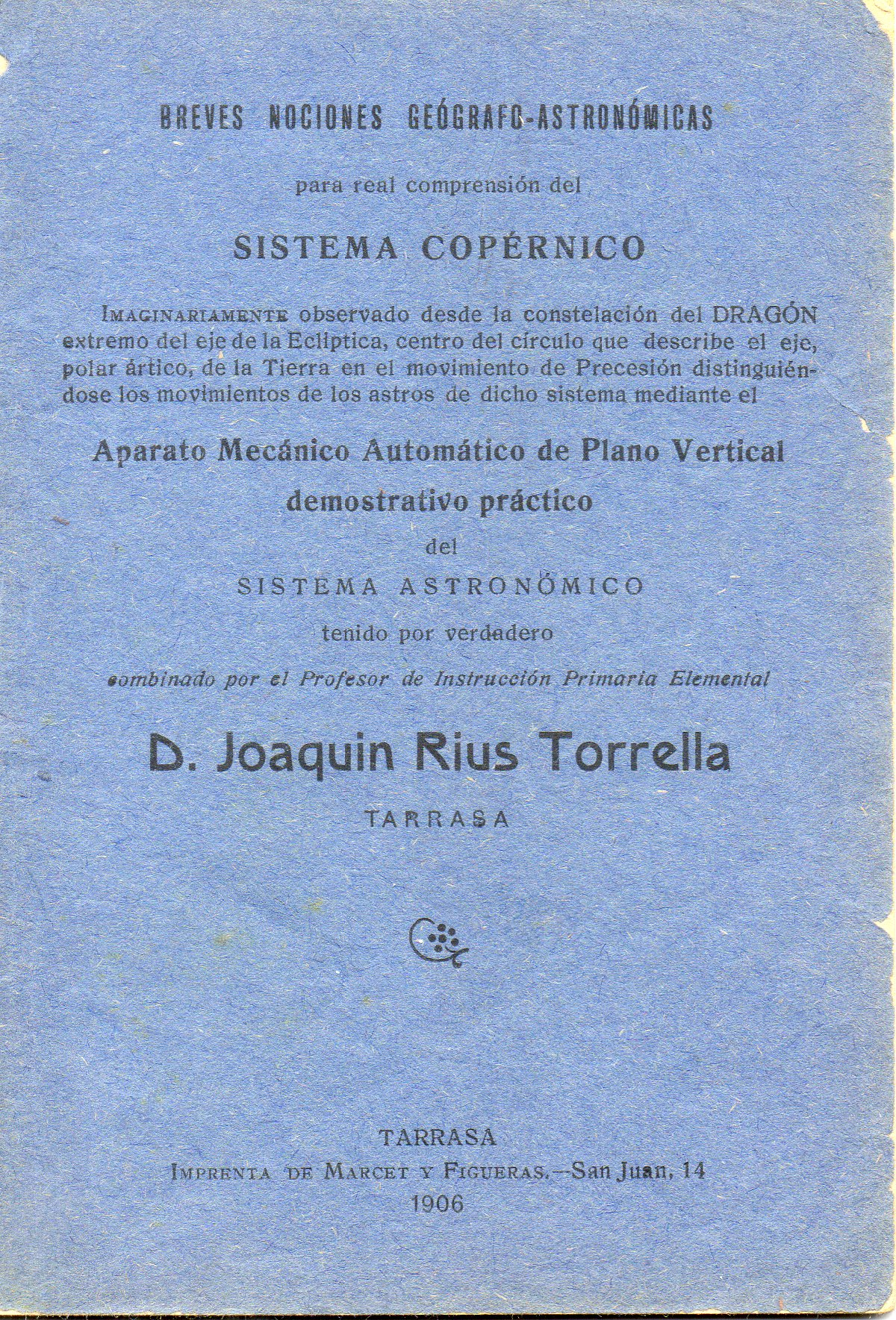 Portada del llibret "Sistema Copérnico" de Joaquim Rius Torrella a Terrassa (Barcelona)